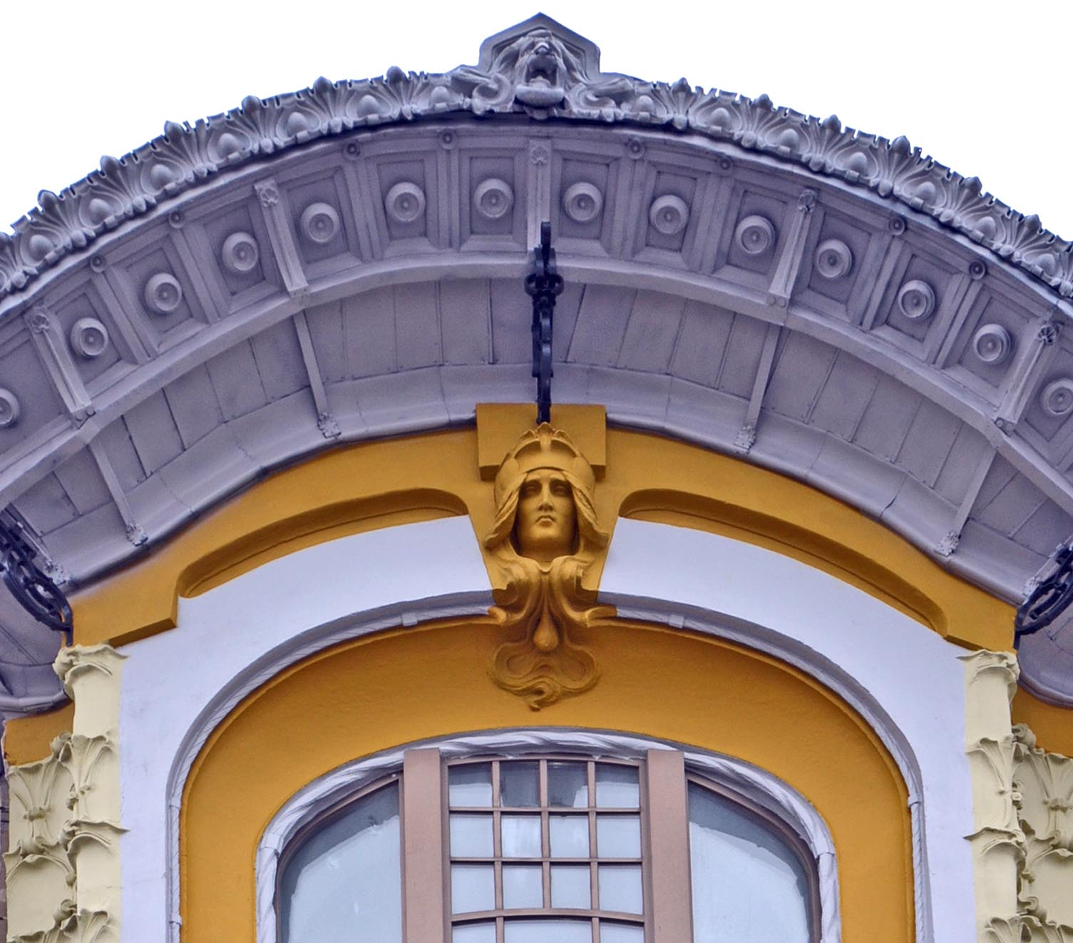 Декор левого эркера доходного дома Исакова на Пречистенке